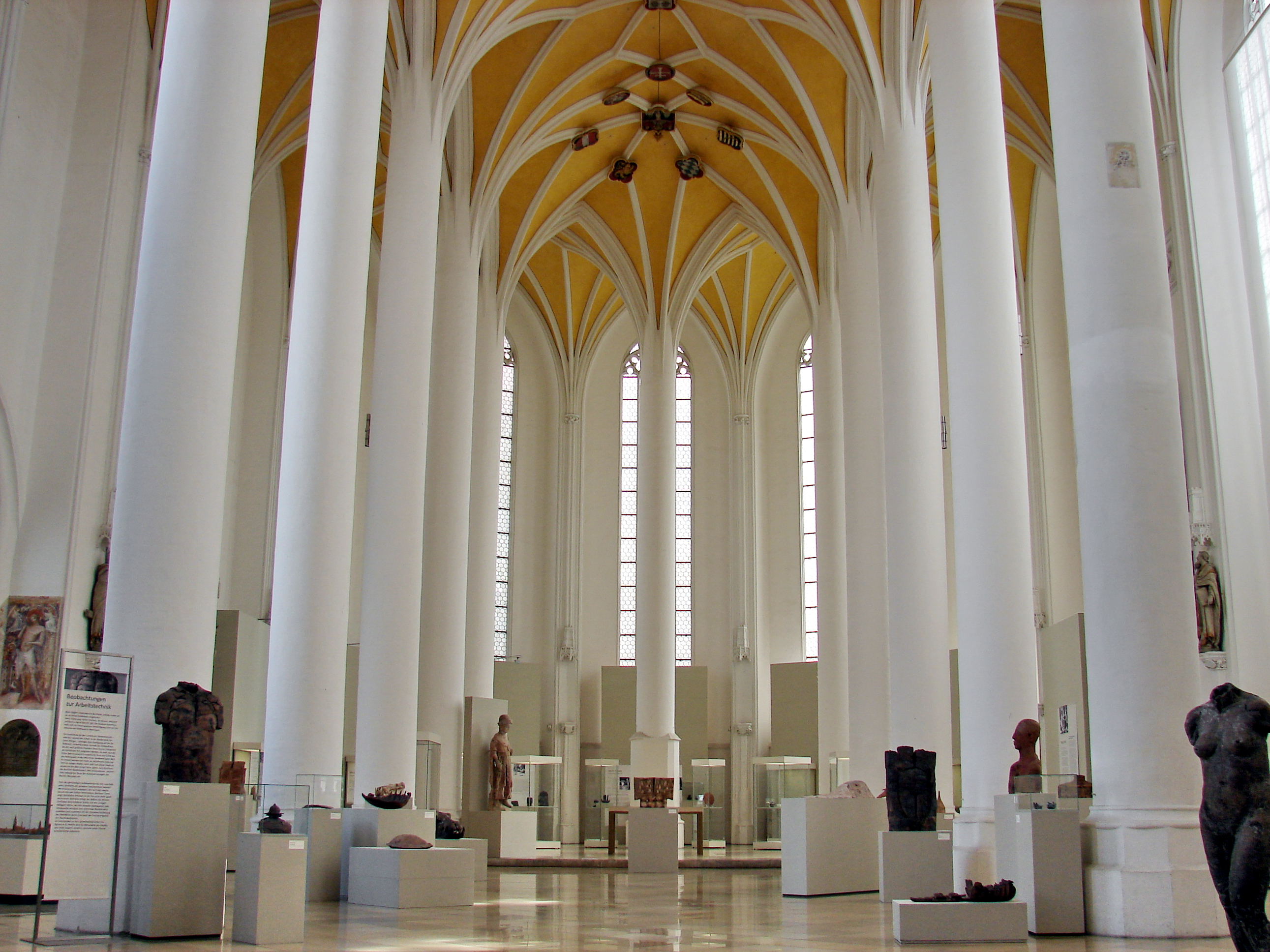 Die Heilig-Geist-Kirche oder Spitalkirche Heilig-Geist in der Altstadt von Landshut ist eine Nebenkirche der katholischen Pfarrei St. Martin.